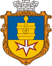 Герб города Алчевск (Луганская область)